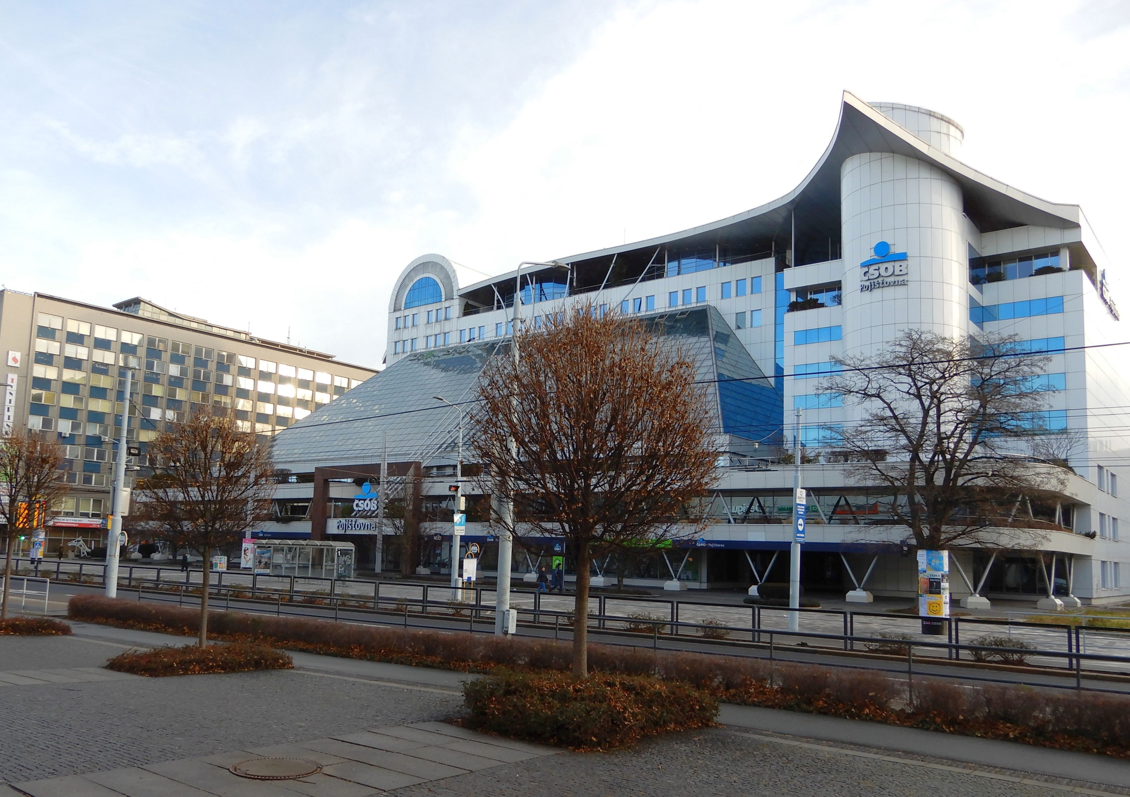 Budova pobočky ČSOB Pardubice